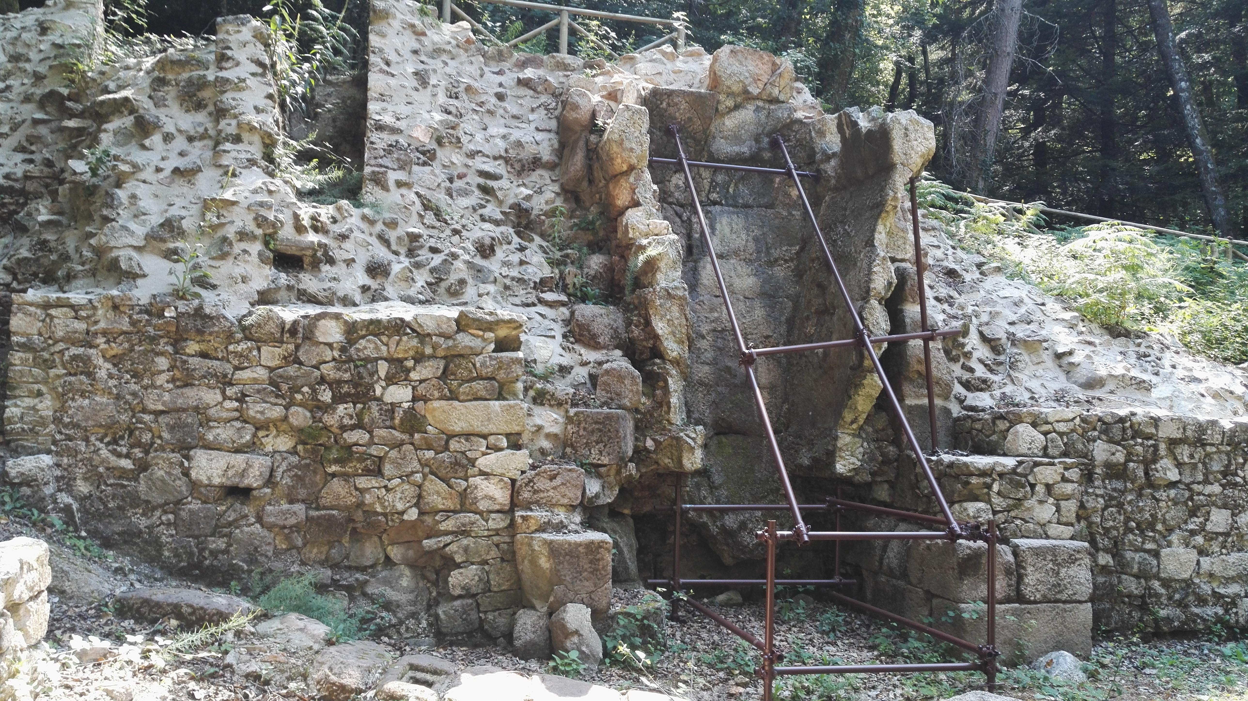 Parco siderurgico di Chiesa Vecchia (Ferdinandea) - Settore produttivo fornace